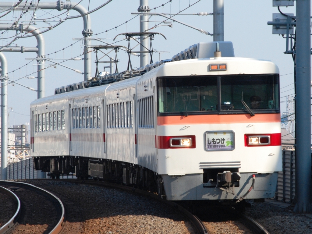 東武350系電車352編成・特急「しもつけ282号」浅草ゆき（2008-12-4・曳舟～業平橋間にて撮影）